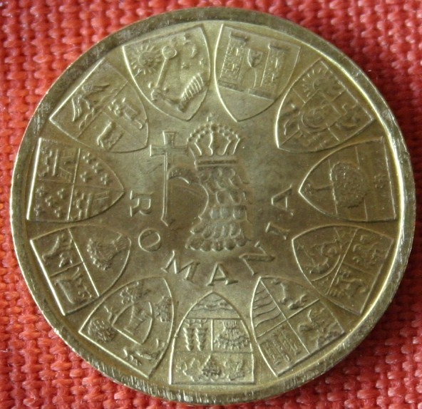 Medaille Anschluß Nordsiebenbürgens an Rumänien